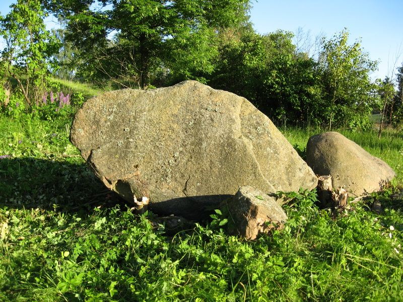 Крыўск. Вялікі крыўскі камень